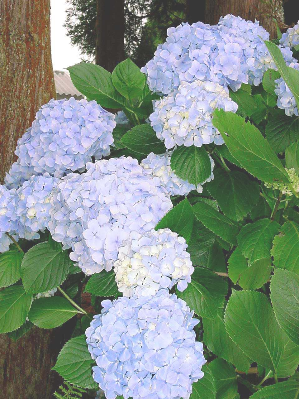 Viveiros da Falca, hortências, ilha Terceira, Açores, Portugal.